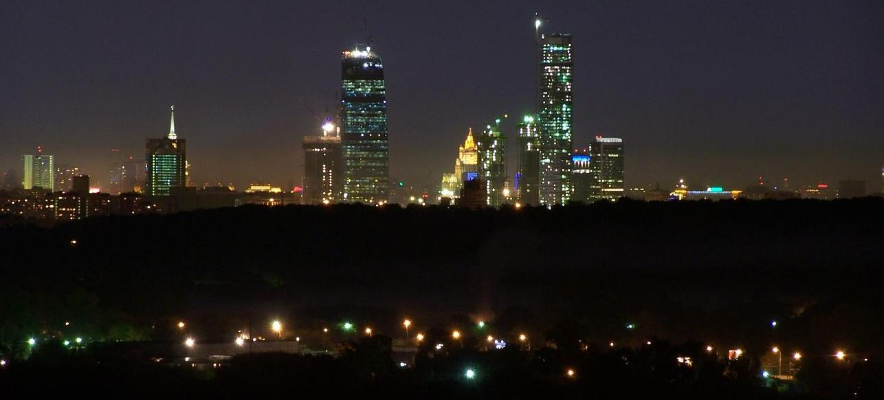 ММДЦ